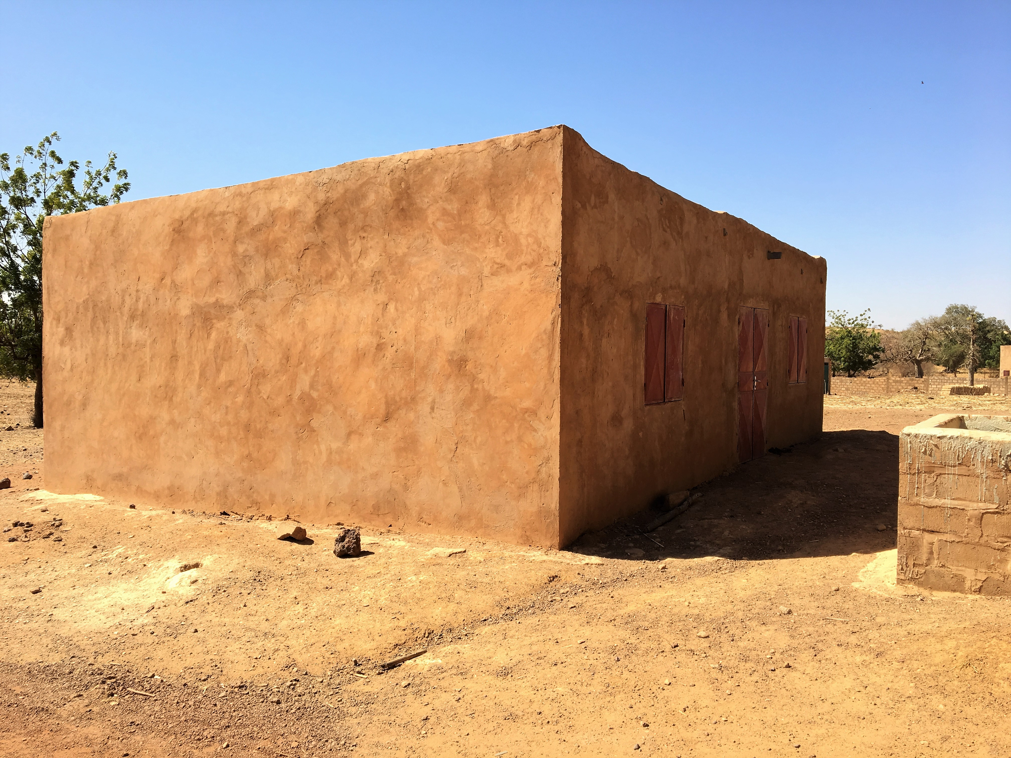 Nouvelle église catholique de Ouazellé, construit en 2016